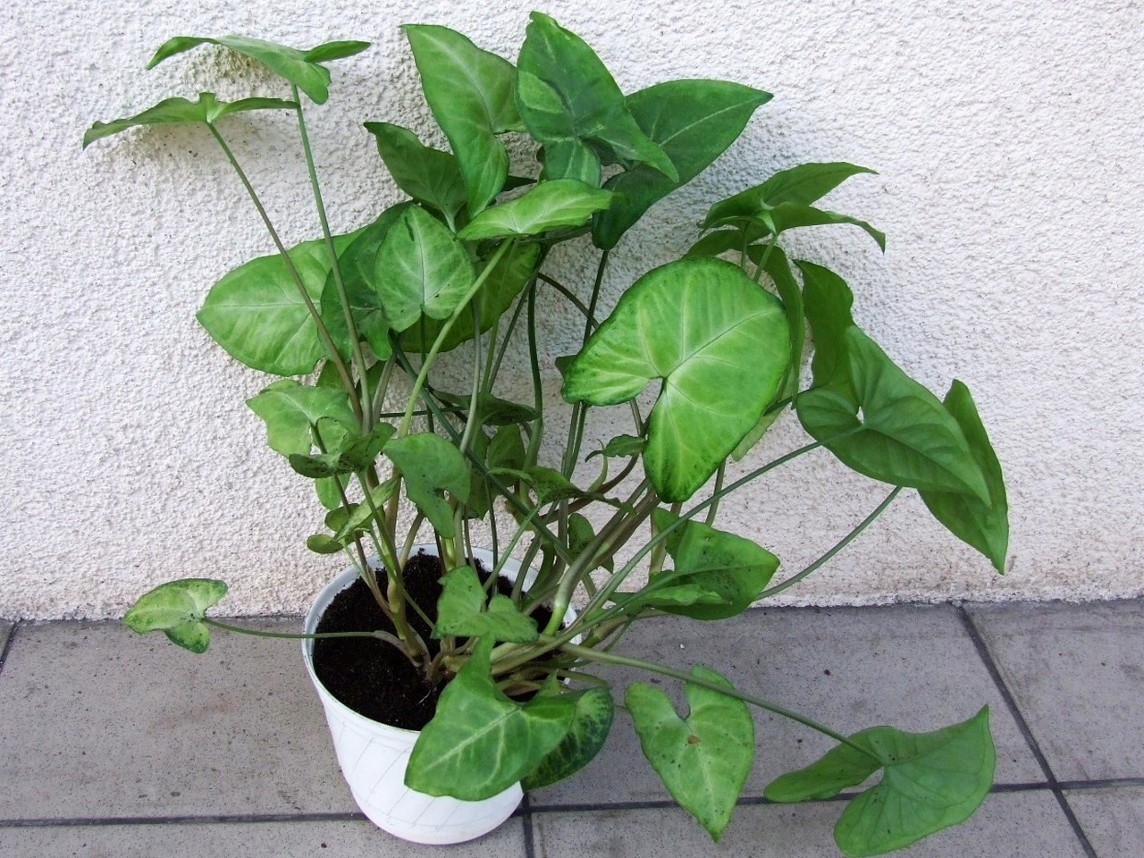 Syngonium podophyllum 'Emerald Green'